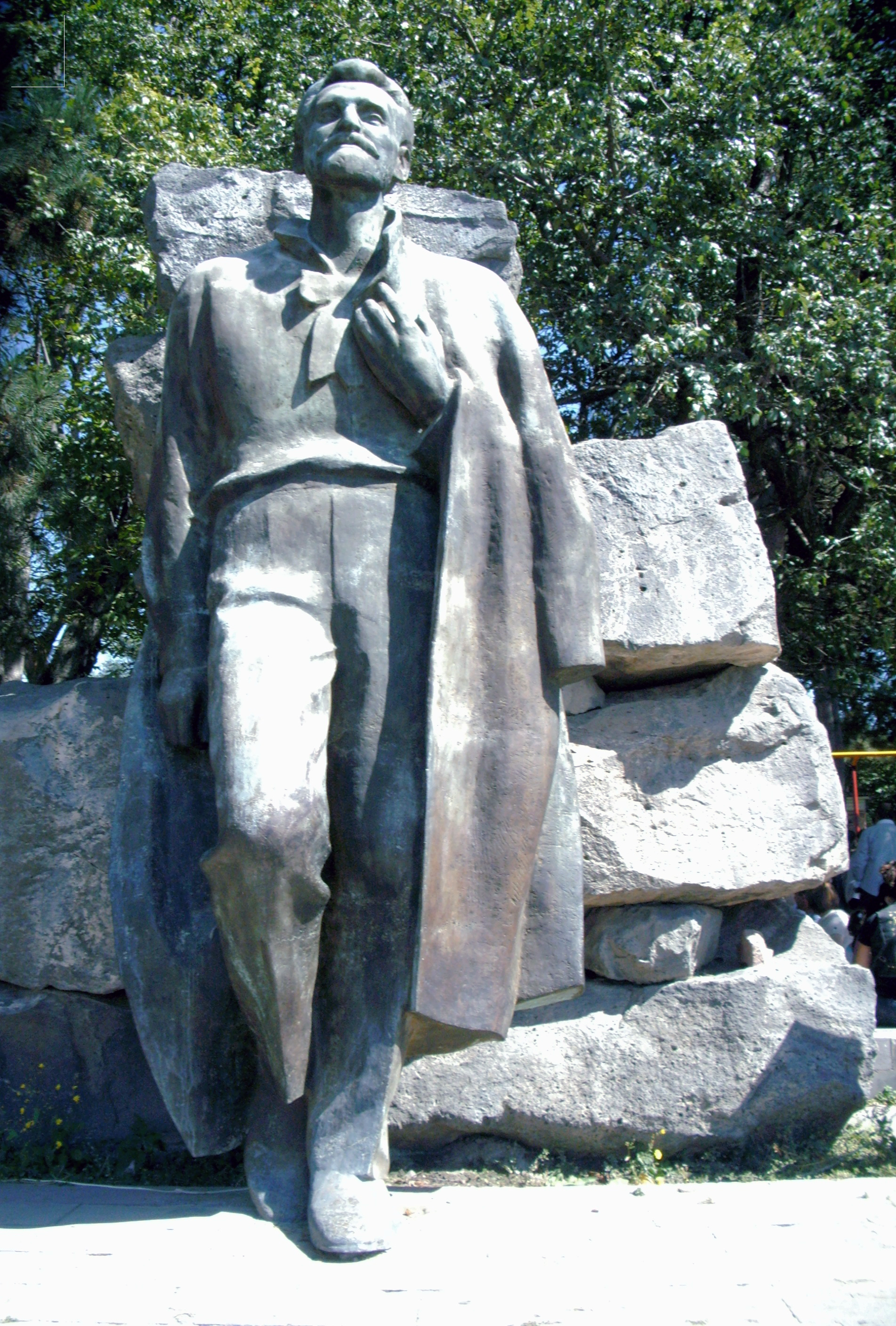 Հուշարձան Հովհաննես Թումանյանին, Դսեղ, 1969 թ., ճարտ.՝ Լ. Սադոյան, քանդ՝. Ղ. Չուբարյան 35/33